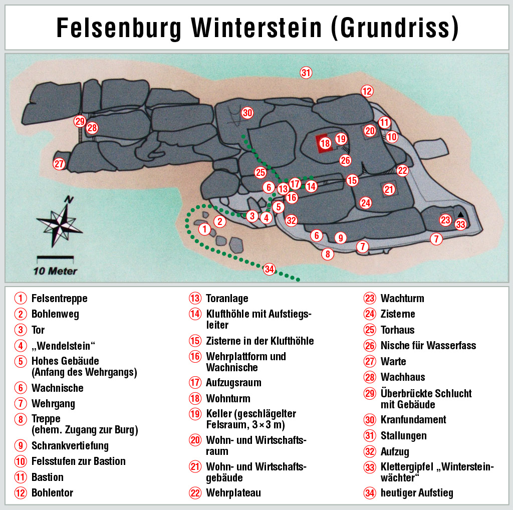 Hinweistafel Felsenburg Winterstein (Sächsische Schweiz)